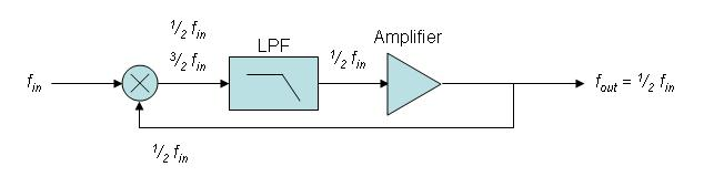 Схема на делител на честота.